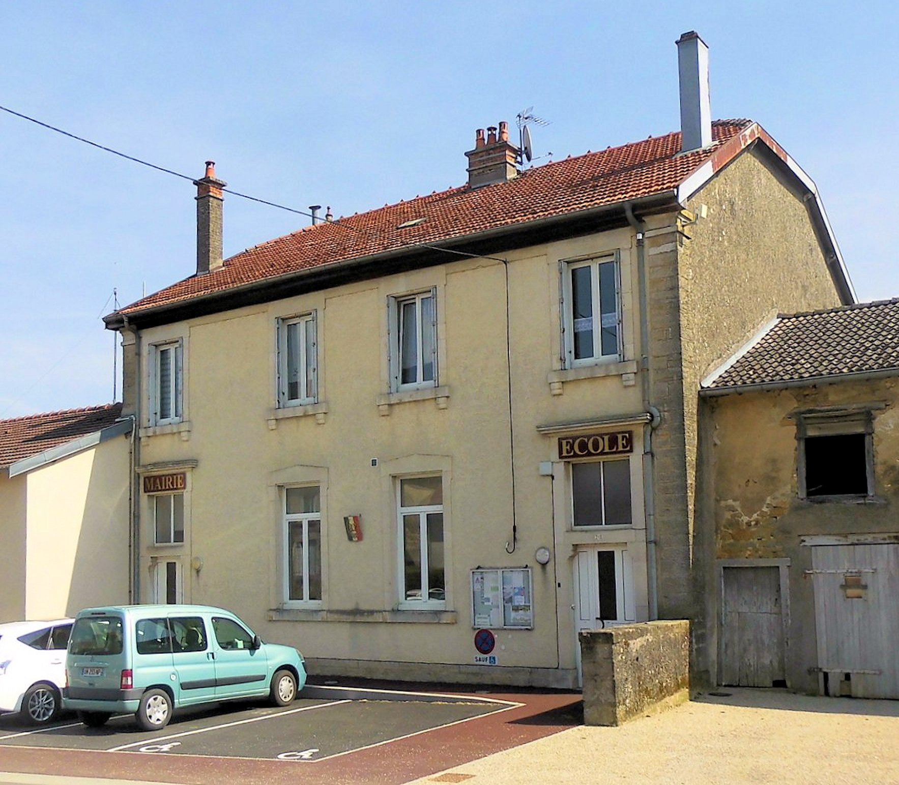 La mairie-école de Rainville